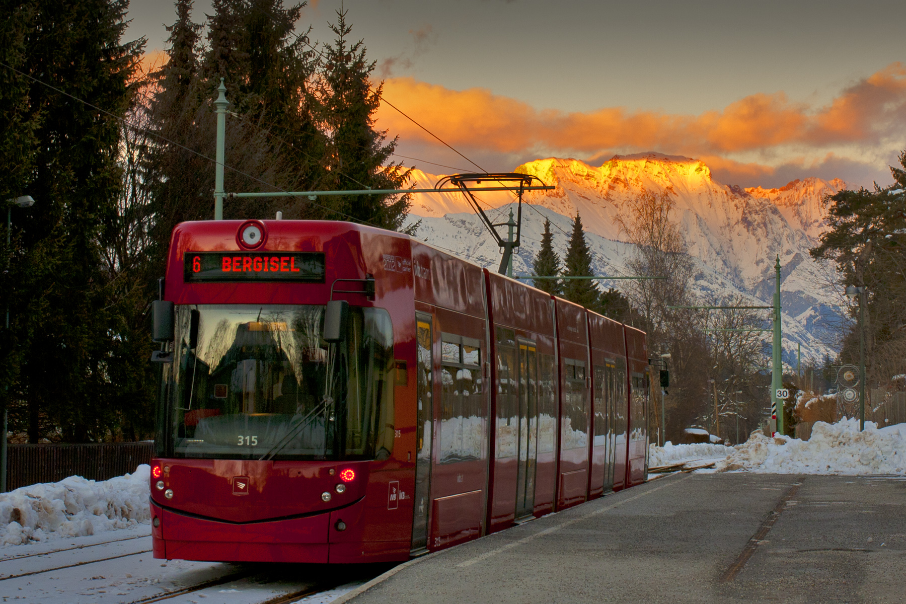 Tw 315 der Innsbrucker Verkehrsbetriebe als Linie 6 in Igls am 14.1.2012